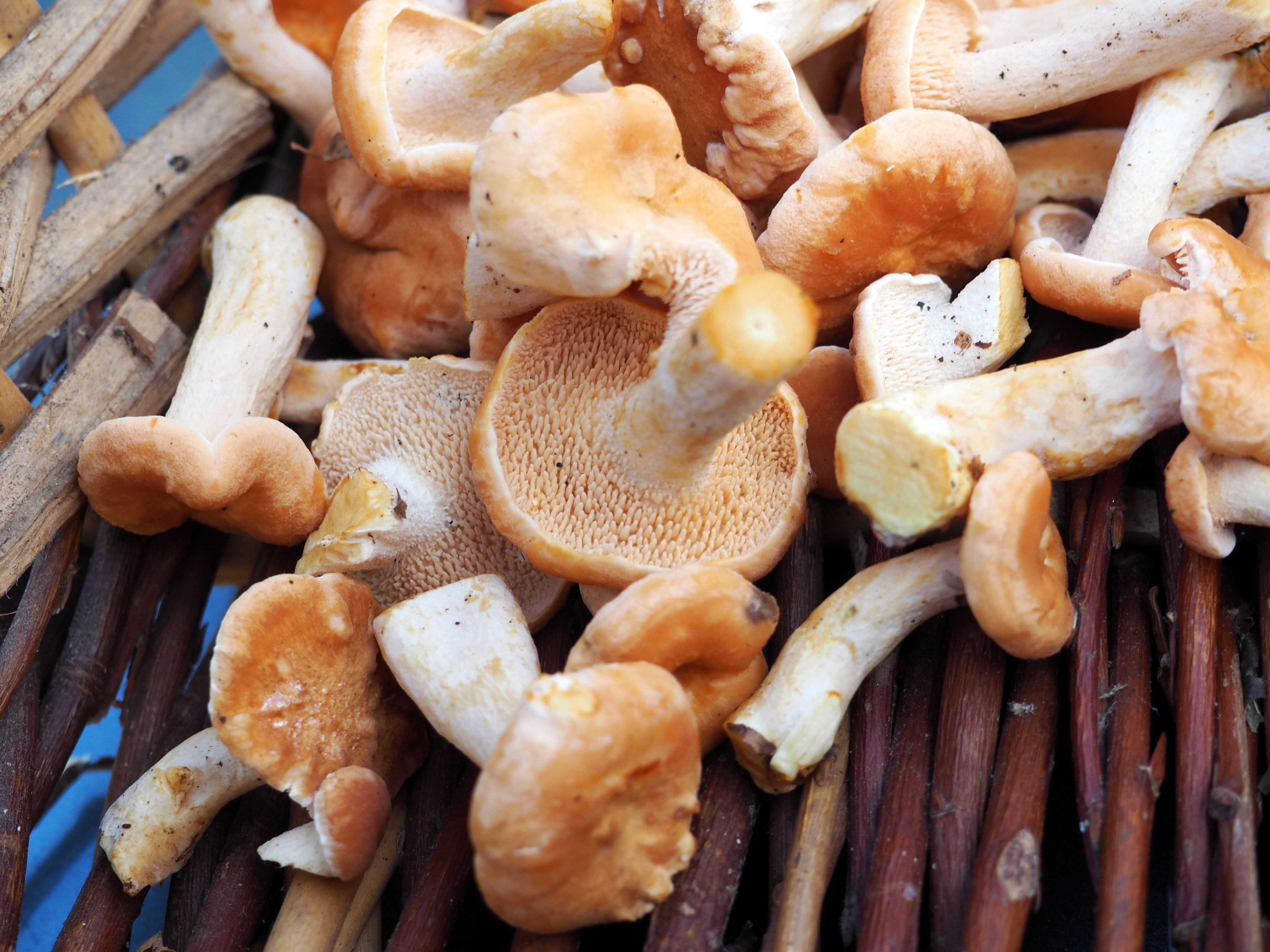 Hydnum rufescens récolté en forêt de Brotonne